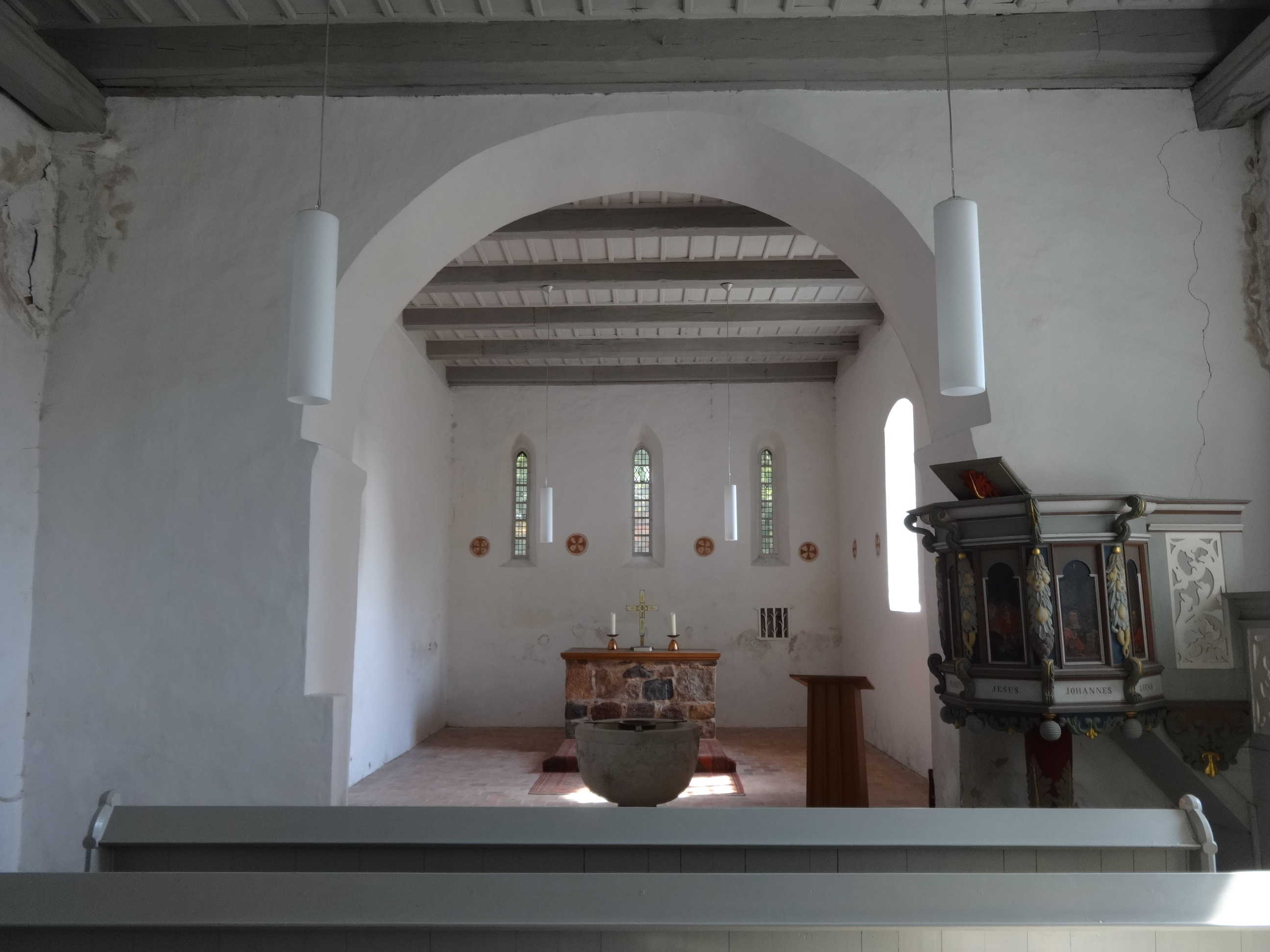 Dorfkirche Werder aus dem 12. Jahrhundert in Werder, Ortsteil von Jüterbog in Brandenburg.